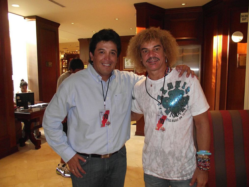 Carlos Valderrama junto a Víctor Rivera en 2012.